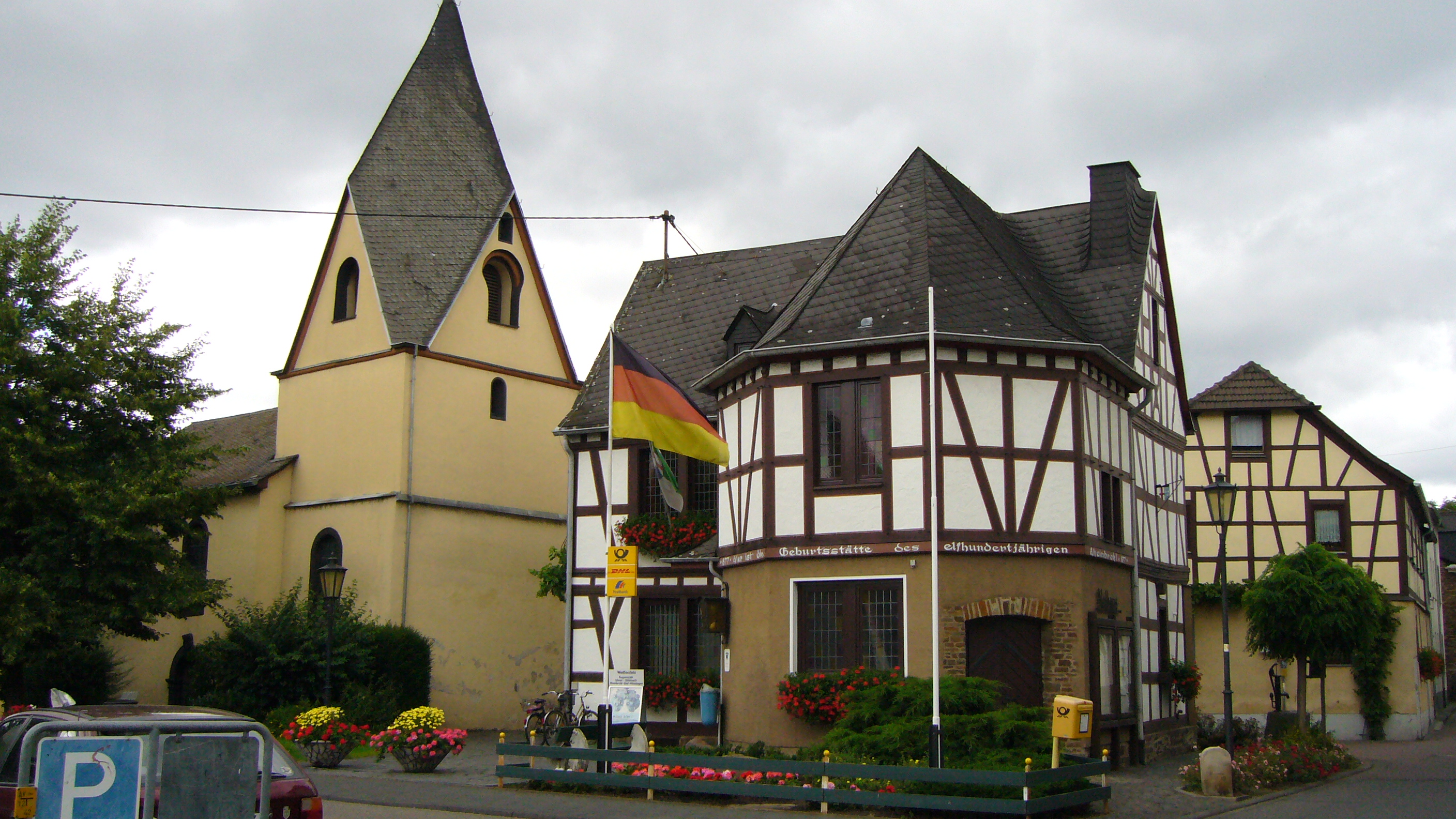 Gertrudenhof mit Kapelle, Rheinbrohl